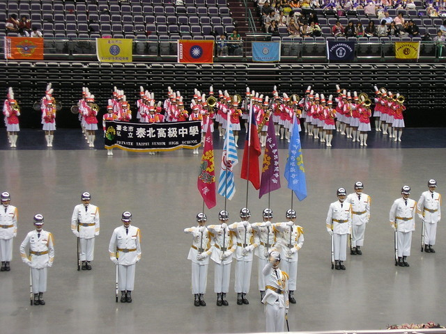 中文（台灣）: 中華民國97年臺北市樂儀旗觀摩表演，泰北高中樂儀隊。